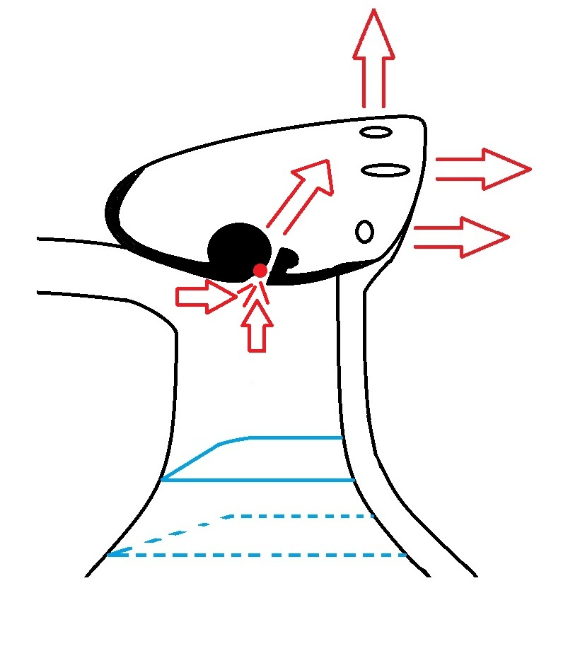 Pfeiftopskizze2-Tonerzeugung